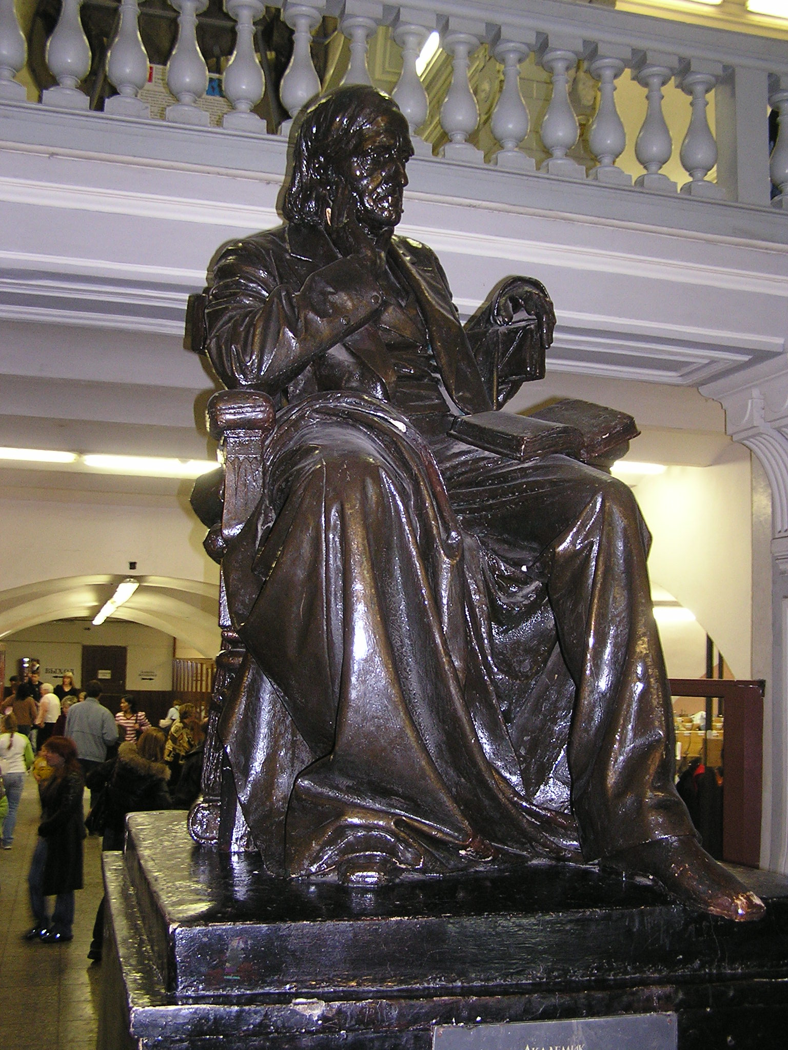 Зоологический музей в Санкт-Петербурге. Скульптура Карла Максимовича Бэра